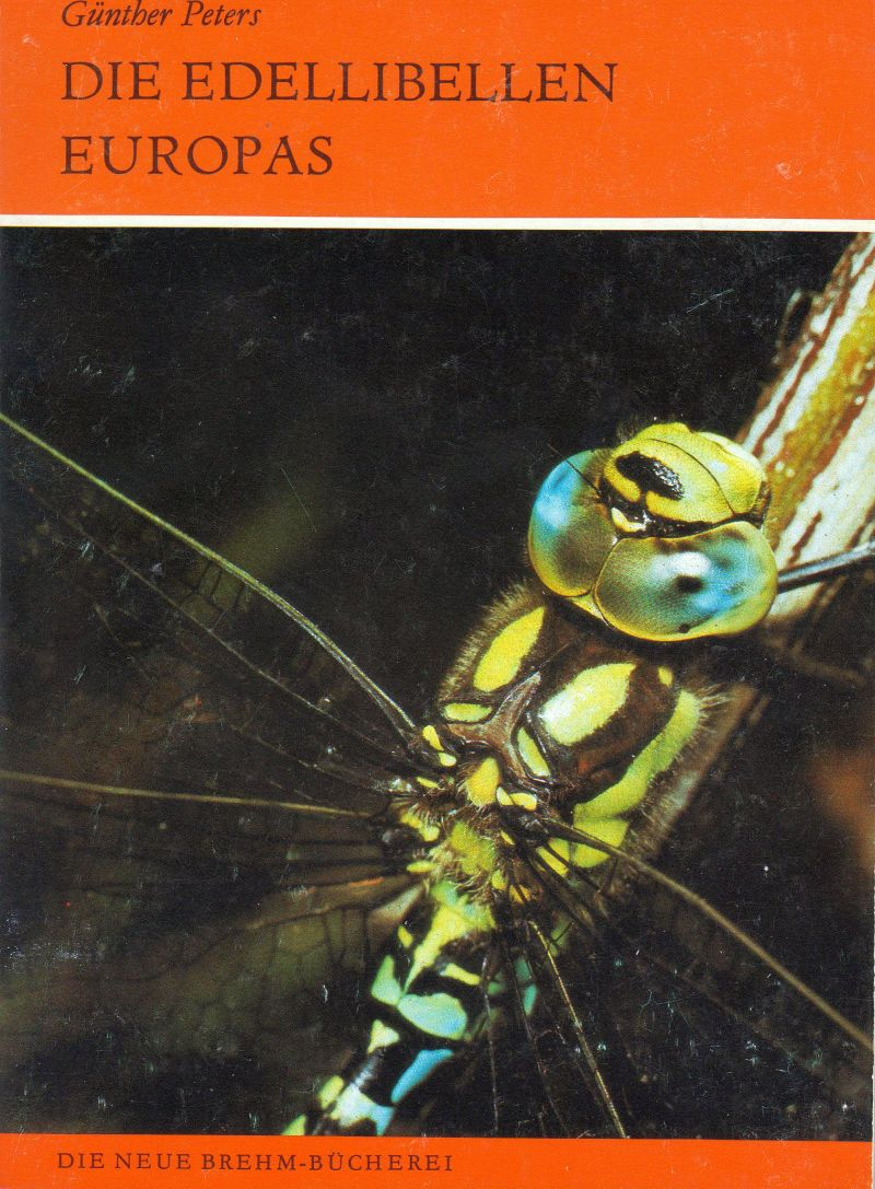 Buchcover Edellibellen